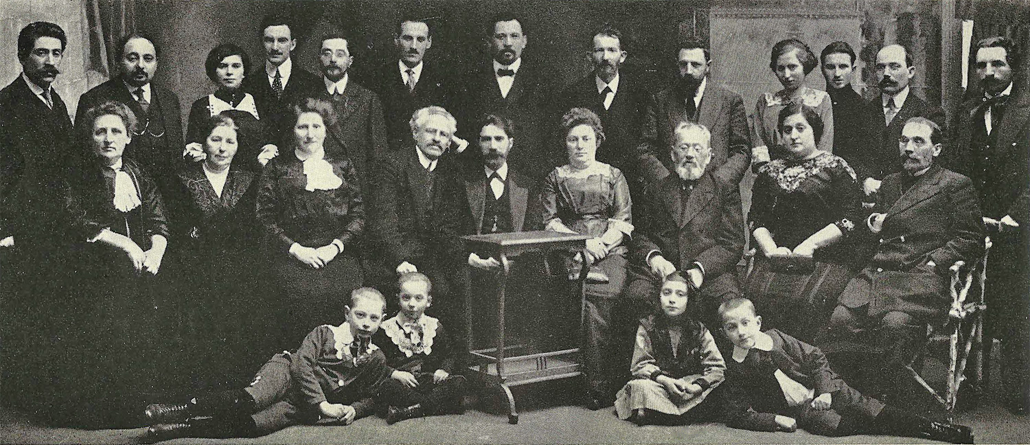 מסיבת ציוני מינסק לכבוד עלייתו של יהודה לייב ברגר לארץ ישראל בשנת תרע"ב-1912. יושבים על הרצפה (מימין): (עו"ד) הרצל ברגר (לימים בן-ארי), אסיה קוּגל, מרדכי ברגר, (ח"כ) הרצל ברגר; יושבים מאחוריהם: עו"ד שמשון רוזנבוים, מרים גולדשטיין-ברגר, יהושע סירקין, מייטה ברגר, יהודה לייב ברגר, יהודה זאב נופך, קיילה רבינוביץ-קפלן, יוהנה (צילה) רוזנבוים, דורה נוסוביץ-נופך; עומדים מאחור: מנחם איצקוביץ (הלוי), מיכל רבינוביץ, חיים ברגר, מלכה סולובייצ'יק, מתתיהו קוּגל, י. גולדמן, אברהם (בן מיכל) קפלן, מיכל קפלן, יצחק ברגר, ישראל מיכל סטוצ'ינסקי, חיה שרה רובין-קוּגל, חיים תנעזר, נח טמקין.